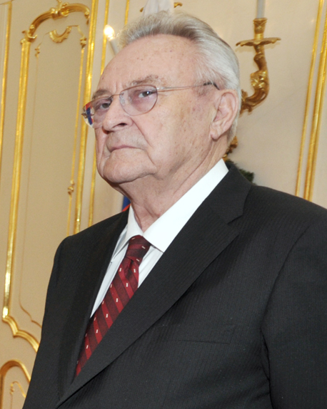 Milan Čič